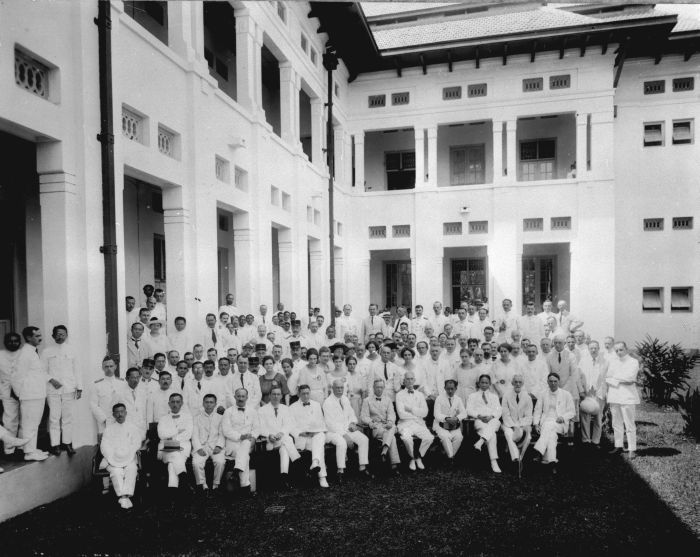 Foto. Groepsportret bij het gebouw van de Stovia